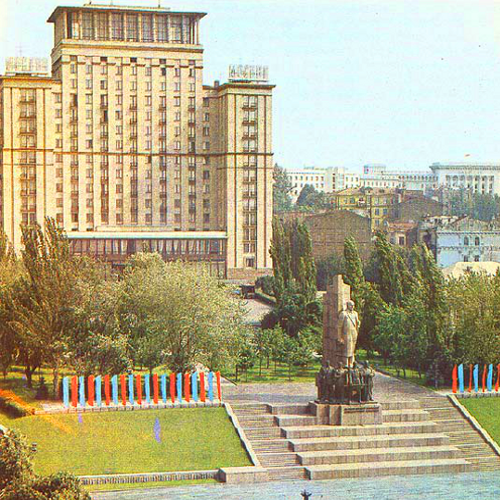 Denkmal der Großen Sozialistischen Oktoberrevolution und Hotel Moskau in Kiew auf dem heutigen Majdan Nesaleschnosti